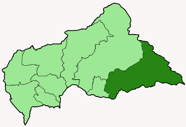 Mappa della diocesi cattolica di Bangassou, nella Repubblica Centrafricana. Anno 2009.